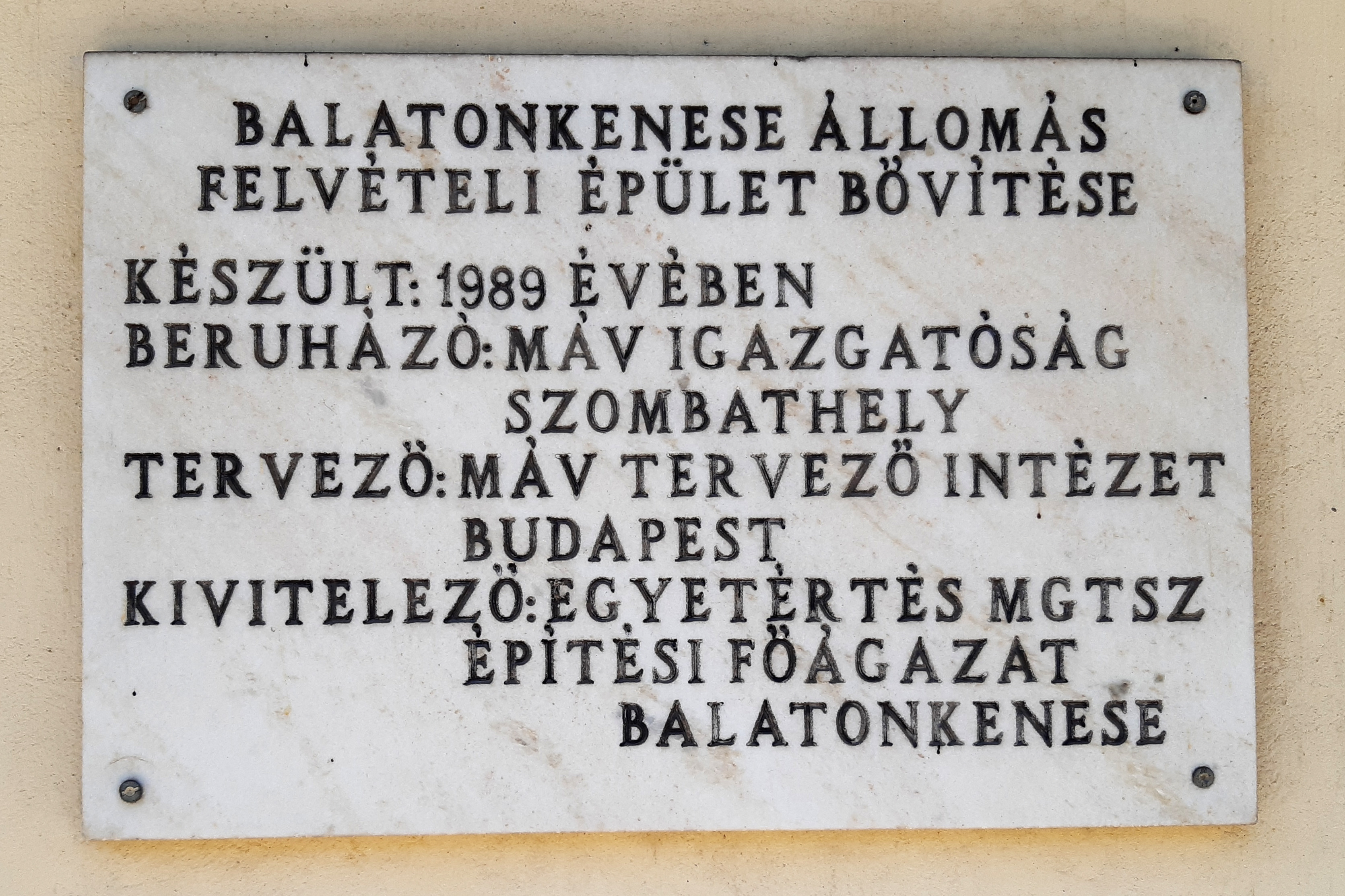 Balatonkenese vasútállomás emléktáblája